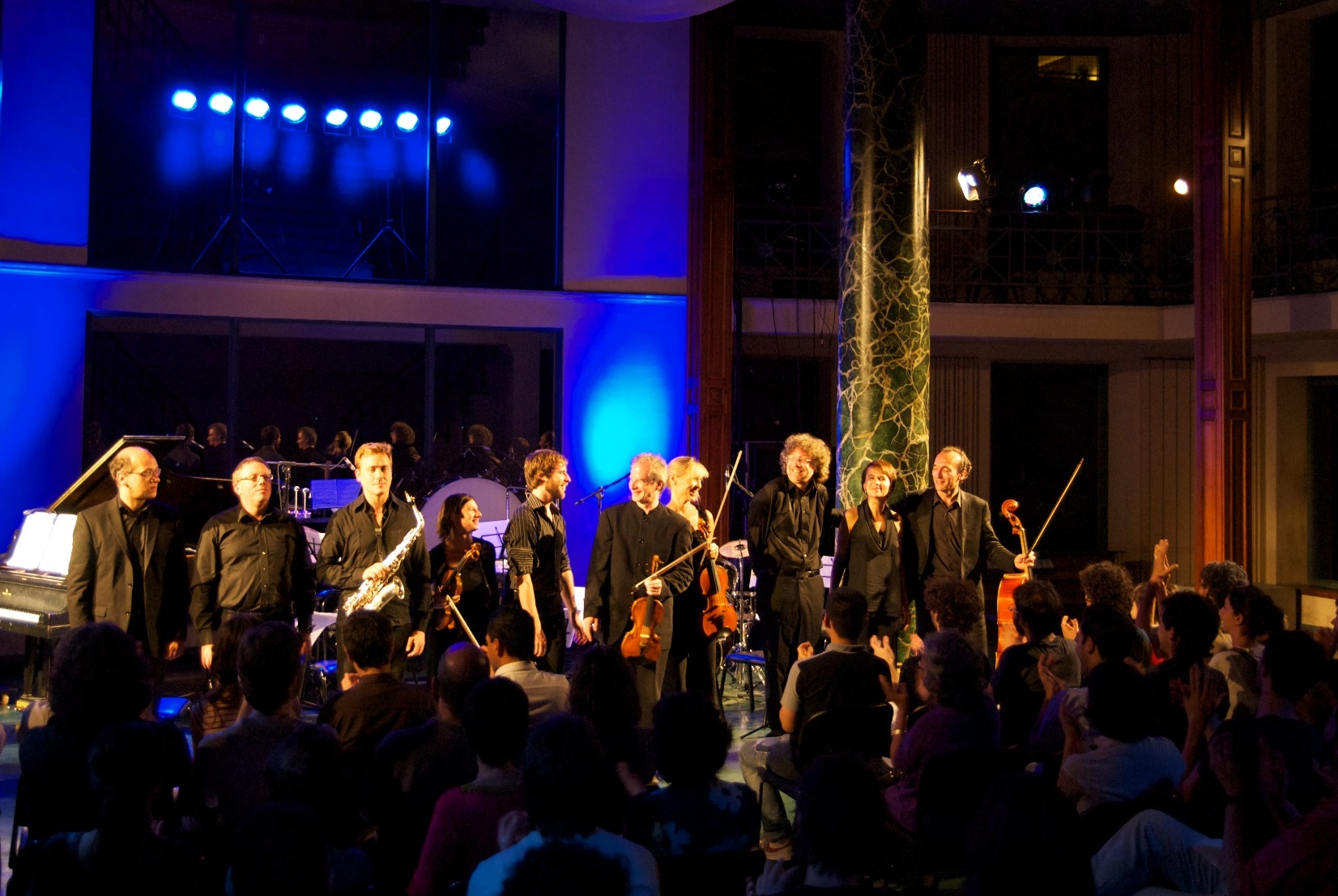 Lucilin au festival Ciclo de Conciertos de Musica Contemporanea de Buenos Aires en 2011